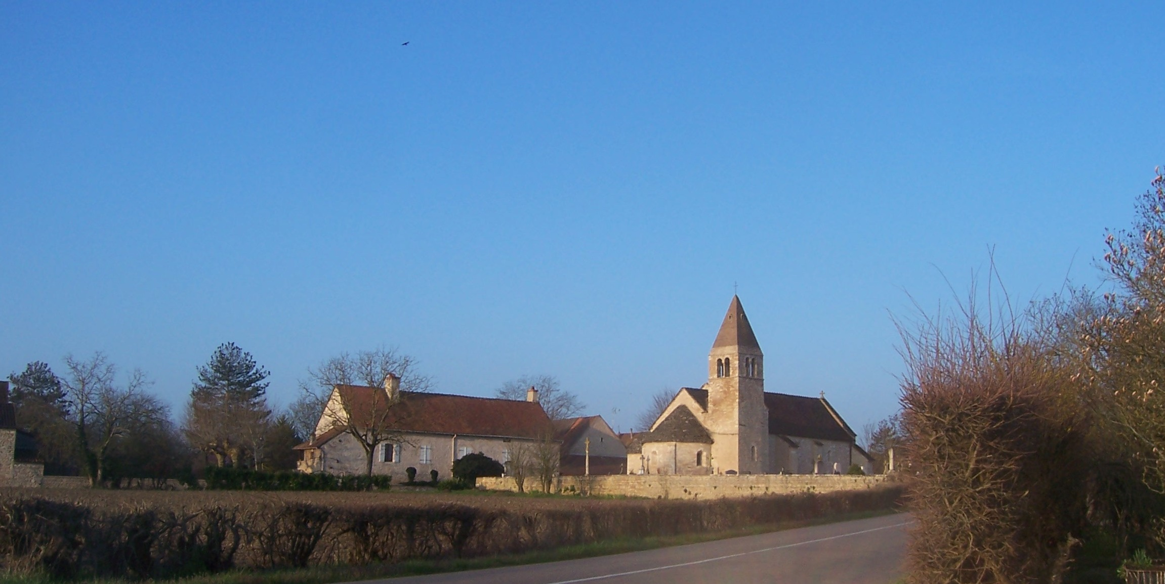 Eglise de Santilly